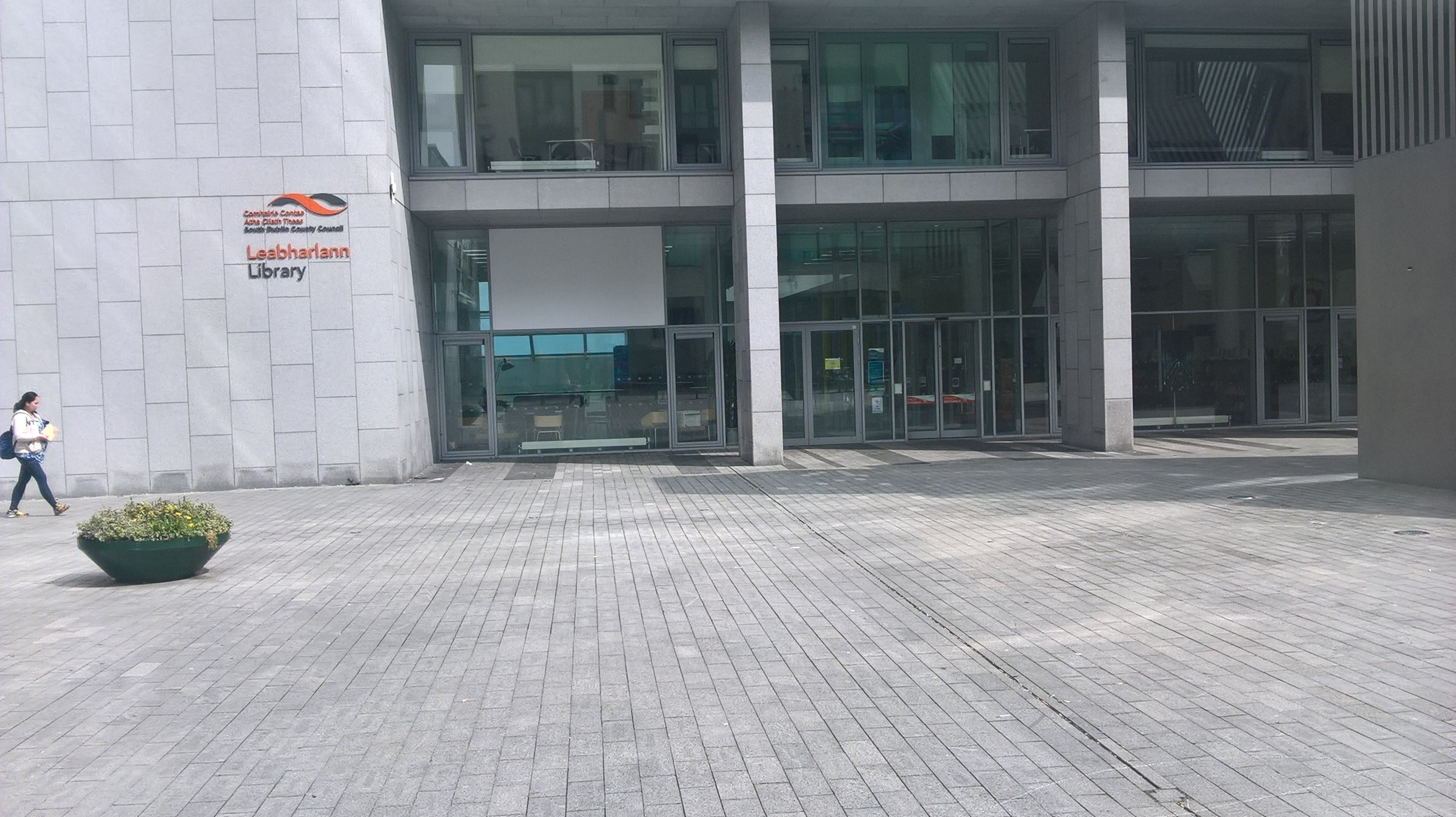 Leabharlann an Chontae, Tamhlacht, Baile Átha Cliath.